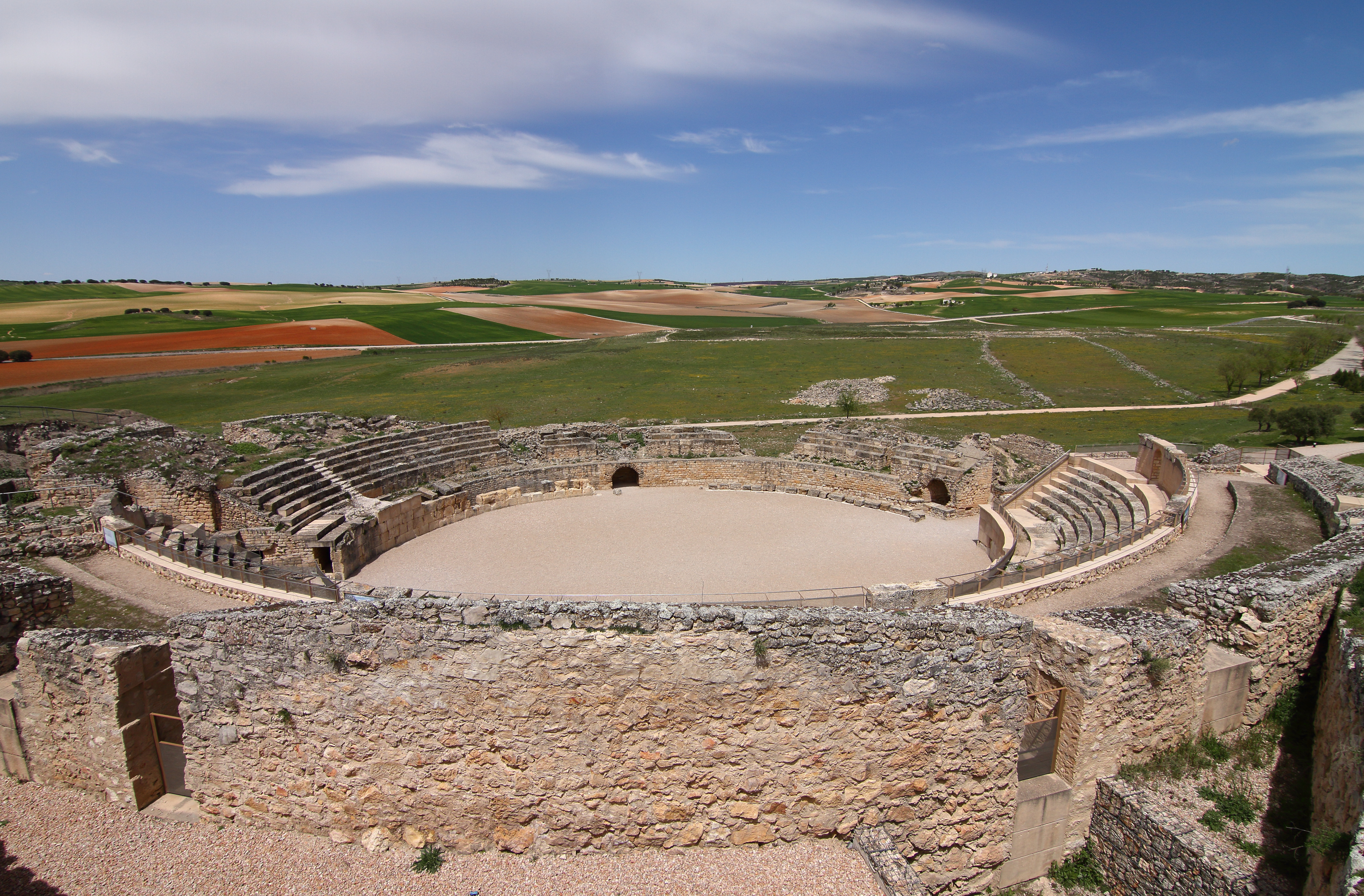 Segóbriga, anfiteatro, vista general, 02